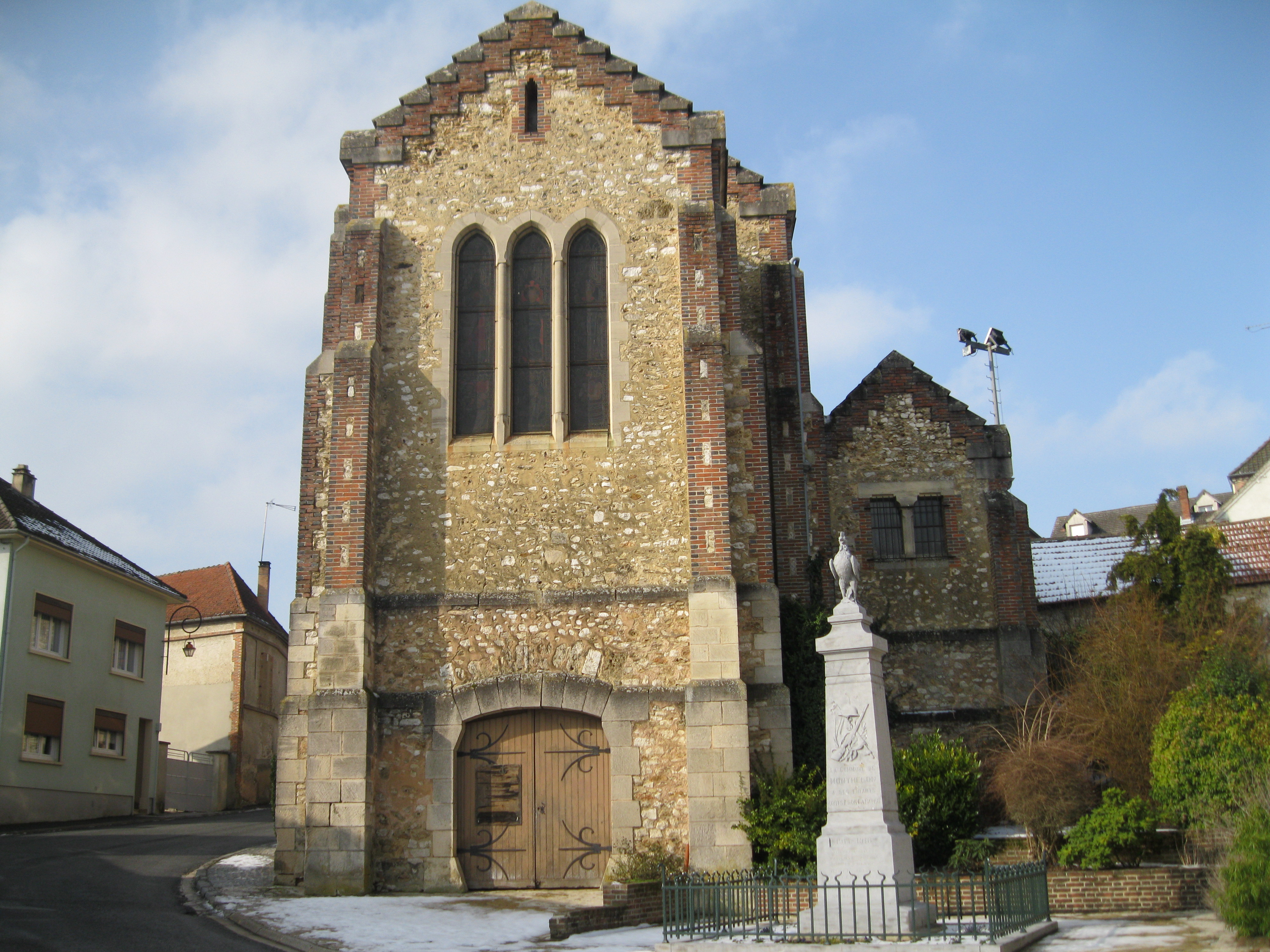 Façade est de l'église Saint-Nicolas et le monument aux morts de Monthelon, dans la Marne.